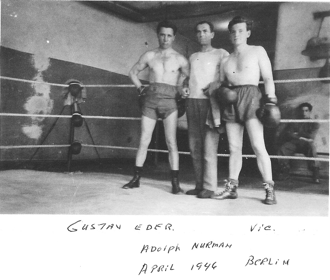 Gustav Eder, Adolph Nurman, und Victor Schneider